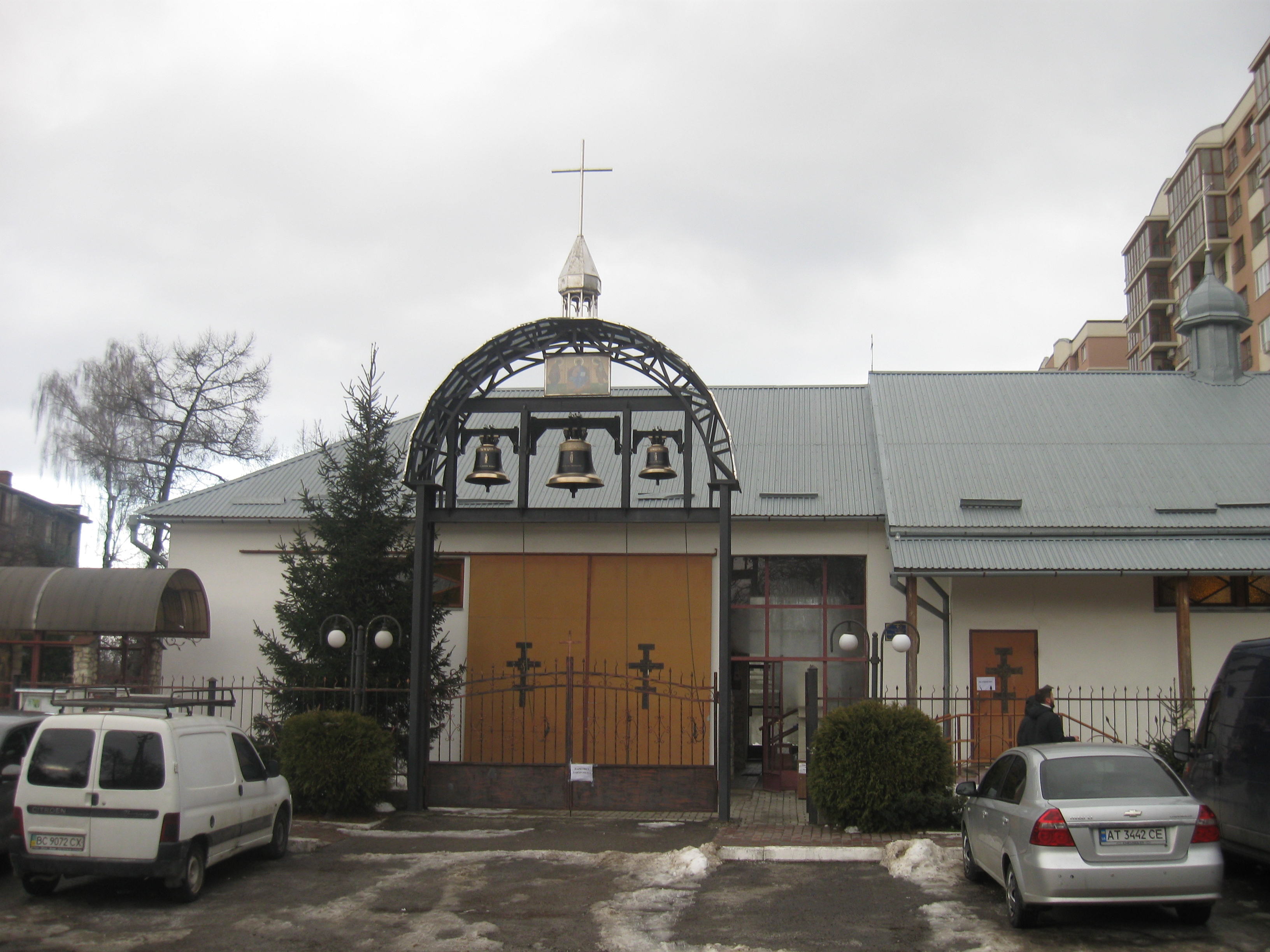 Церква Різдва Святого Івана Хрестителя (УГКЦ) на вулиці Лук'яна Кобилиці у Львові, грудень 2018 року